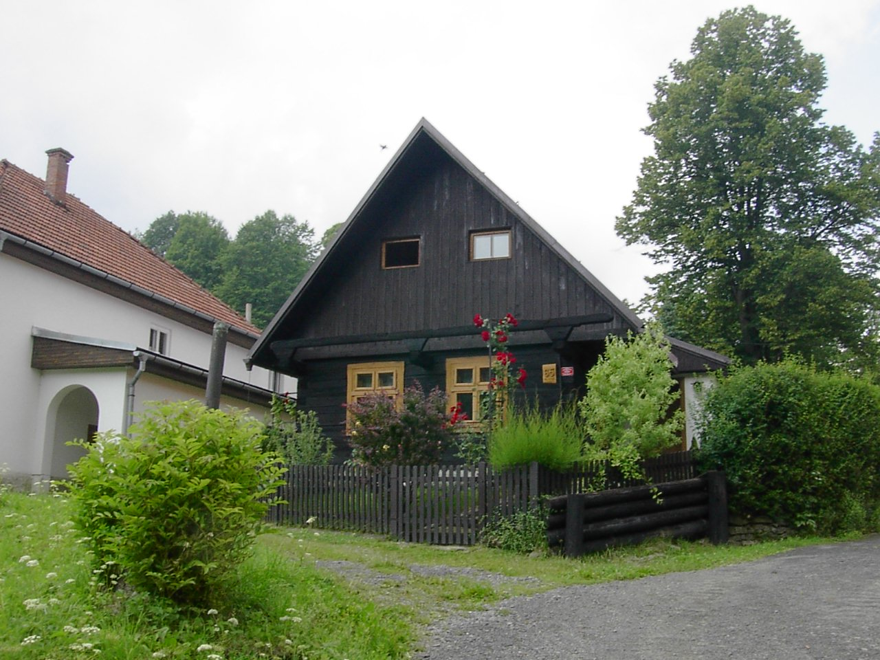 Old wooden house in valašská senice